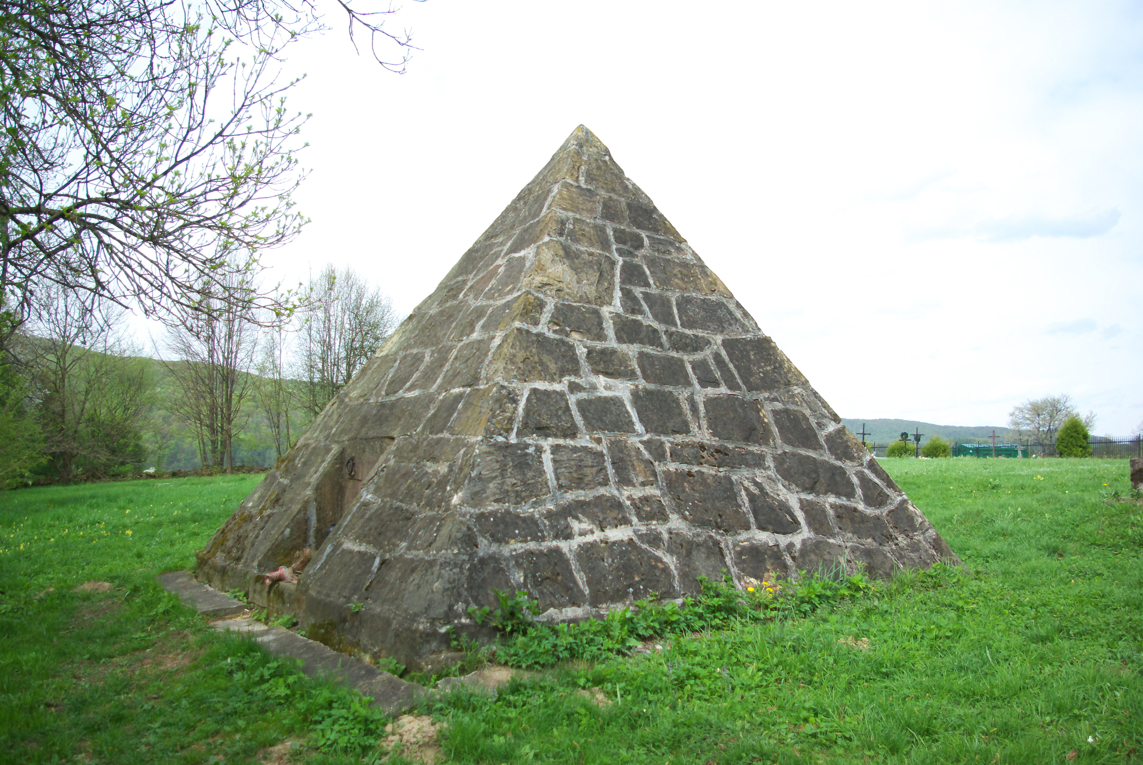 Piramidalna krypta grobowa rodziny Kulczyckich w Międzybrodziu